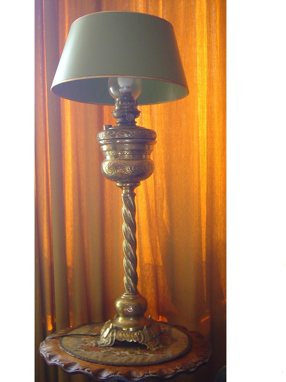 Lampe à huile en dinanderie, vers 1860.